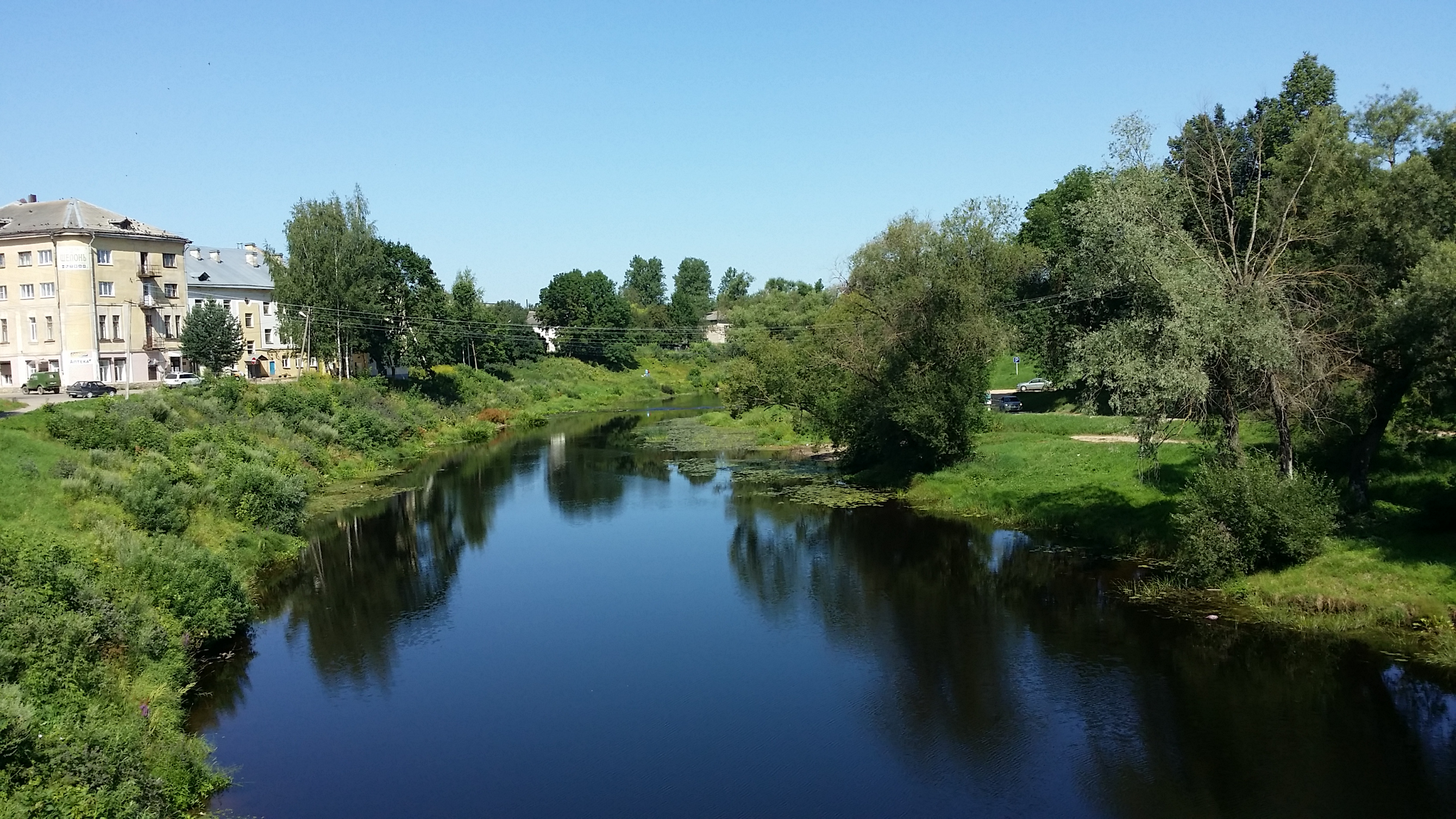 Шелонь в Порхове